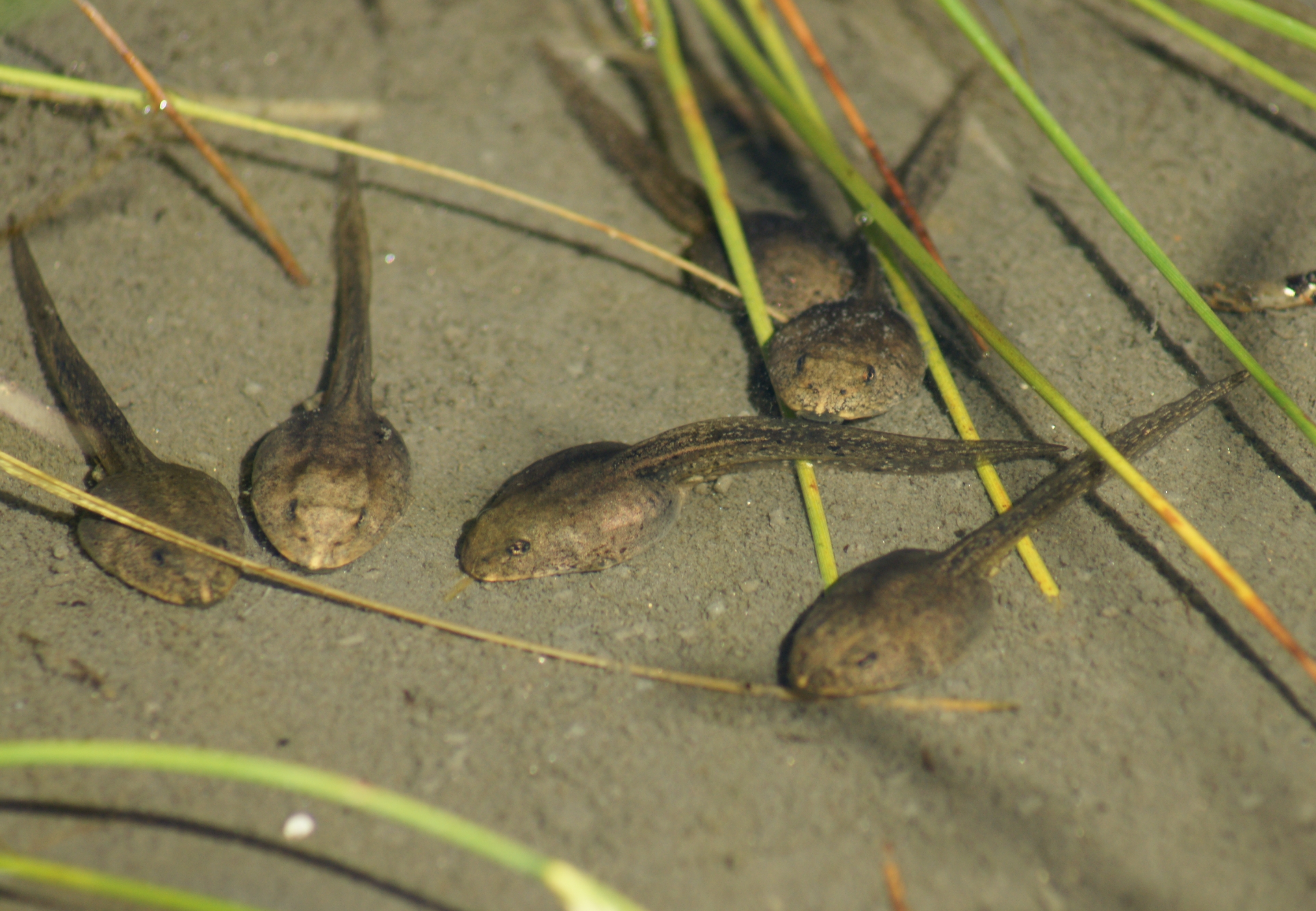 Grasfrosch-Larven; Kaulquappen sind nachembryonale Entwicklungsstadien – die Larven – der Froschlurche. Abgebildet in der Nähe des Herzsees am Fusse des Hochjochs.